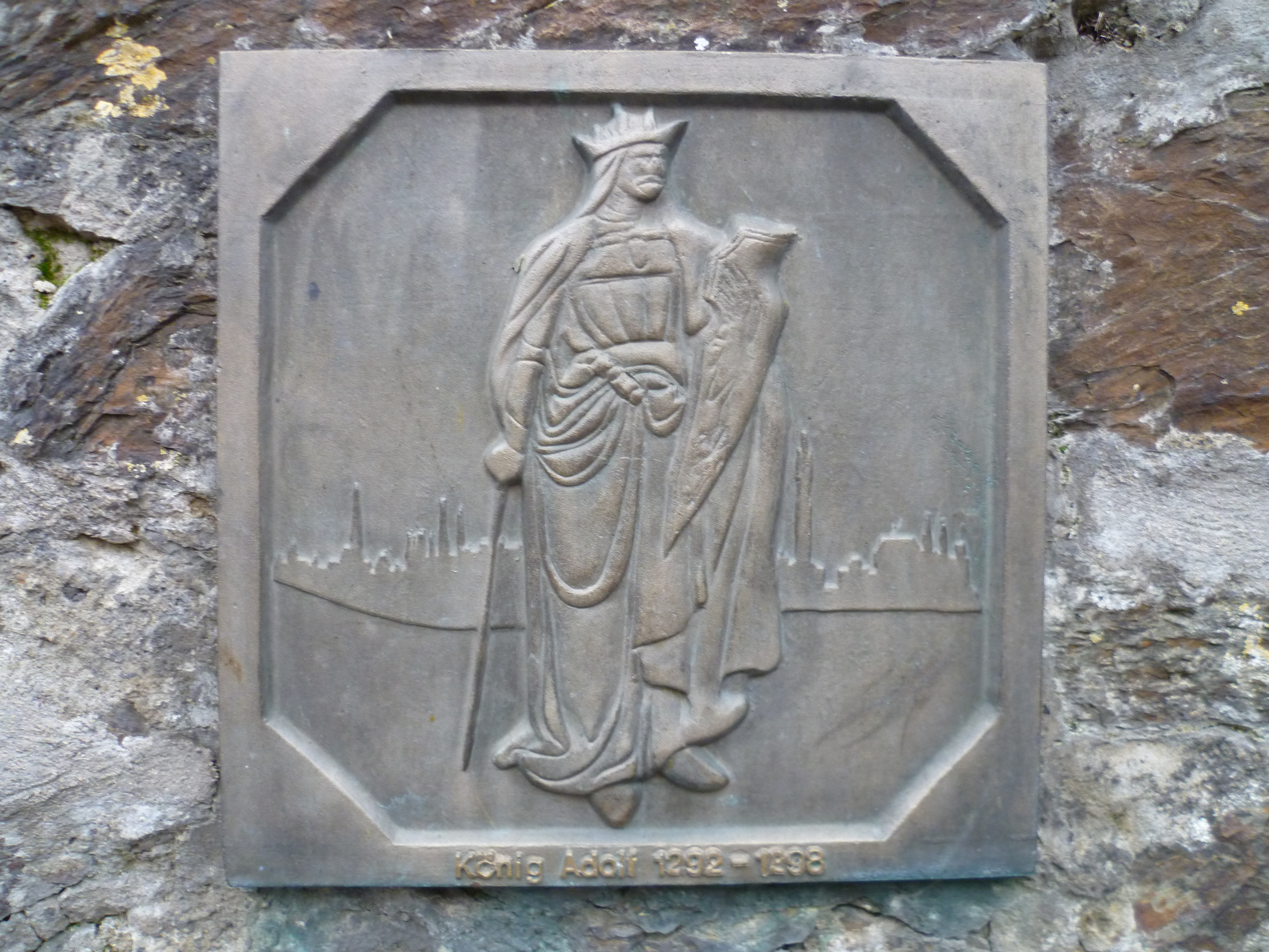 König Adolf von Nassau in historischer Darstellung auf einer Plakette am König-Adolf-Platz in Idstein